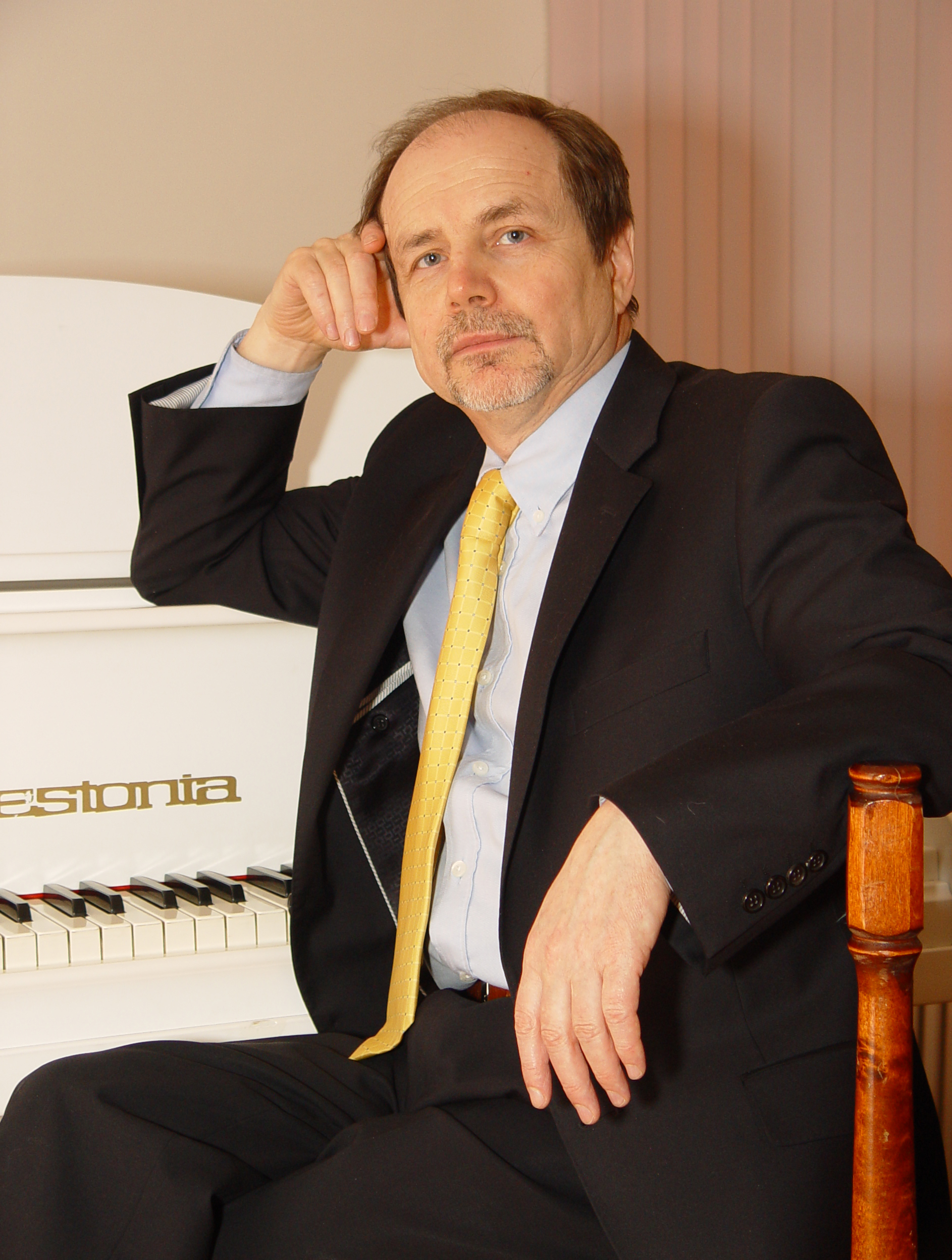 советский и российский баянист, заслуженный деятель искусств РФ